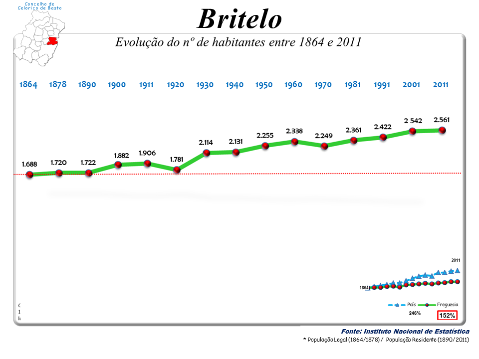 Censos 1864/2011